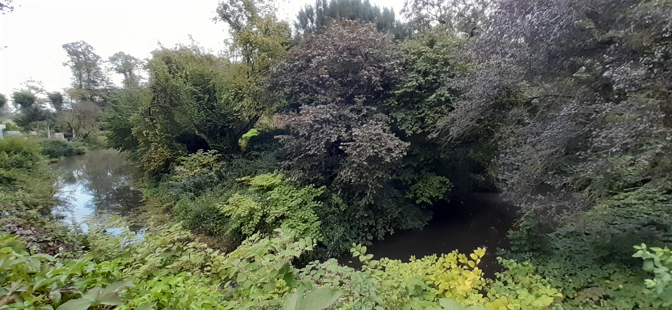 Blick auf den Burgstall Uttum von Norden